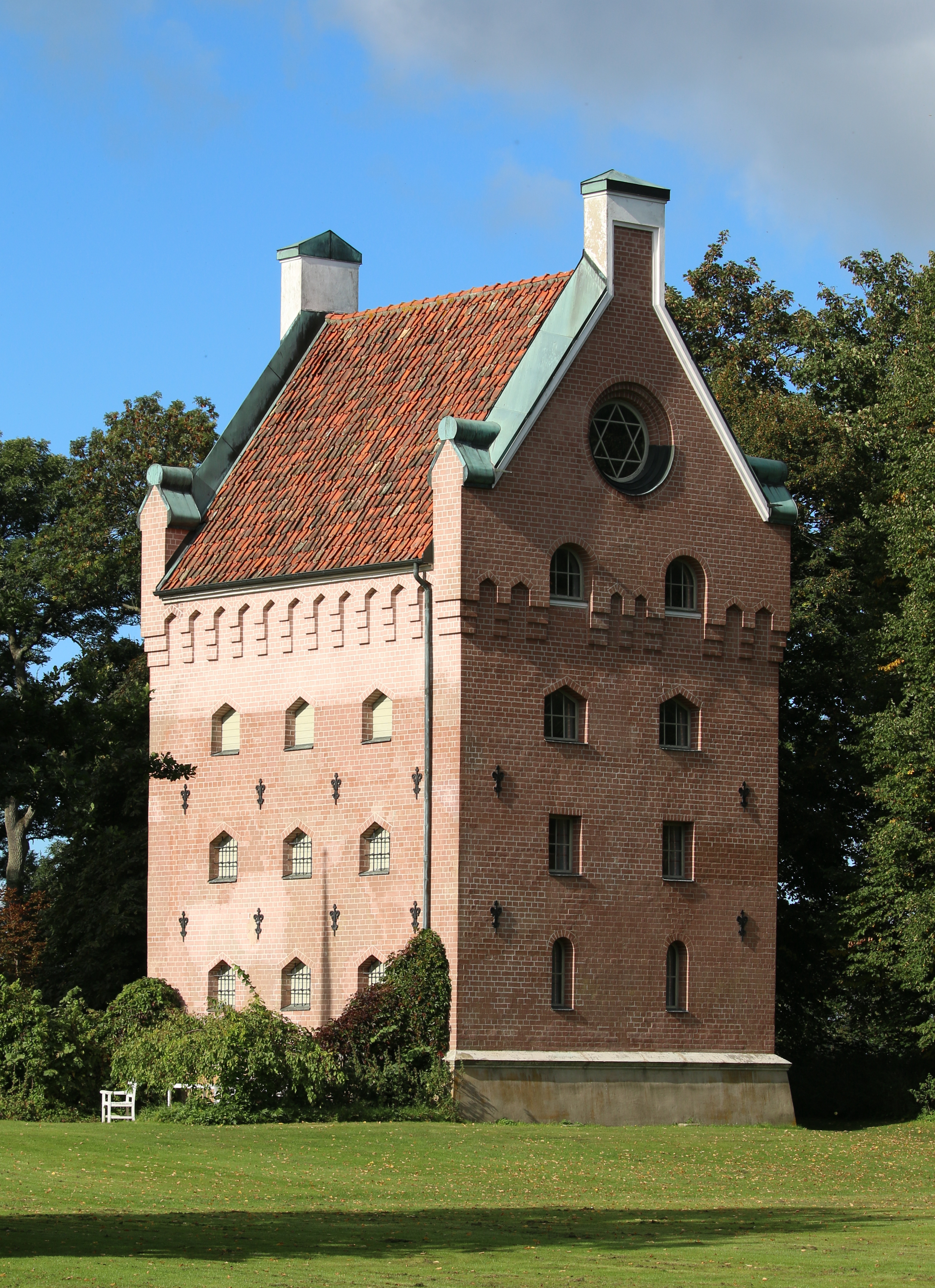 Borgeby slott (Borgeby 23:6)